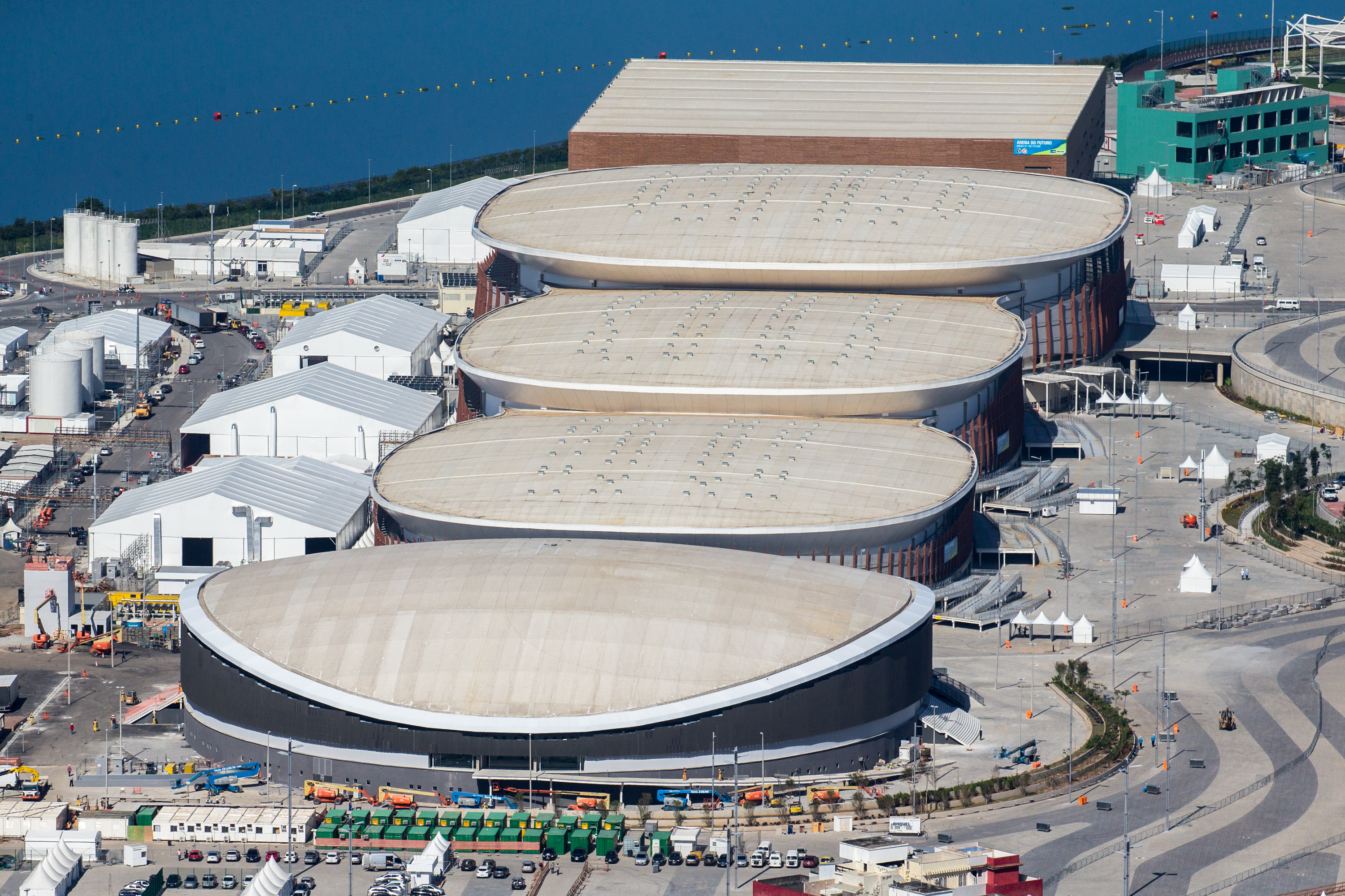 Arenas Cariocas dos Jogos Olímpicos de 2016